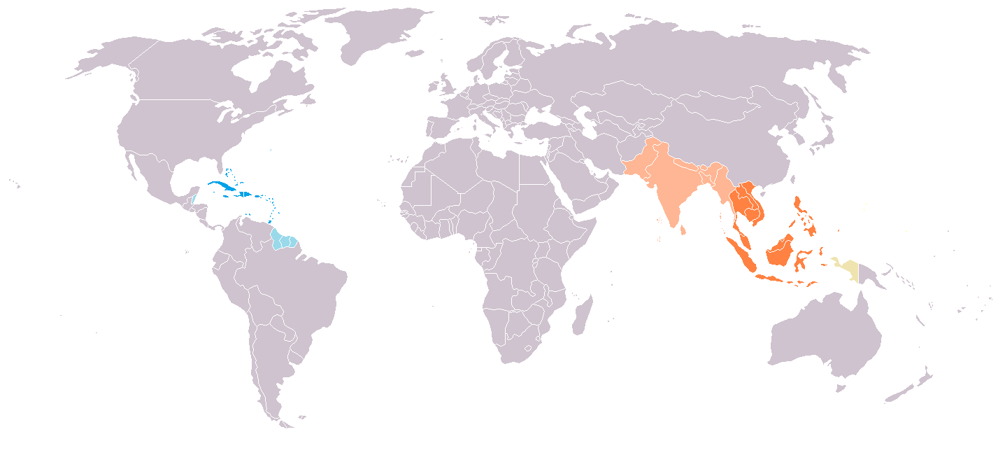 Indies